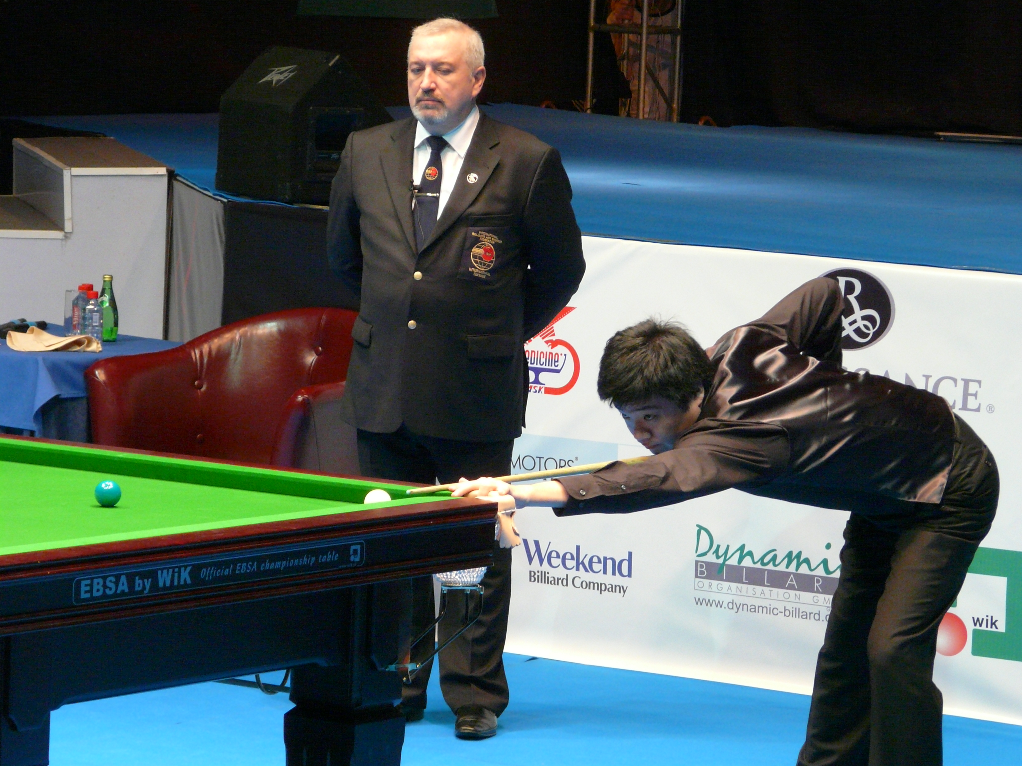 Туринир World Series of Snooker в Москве